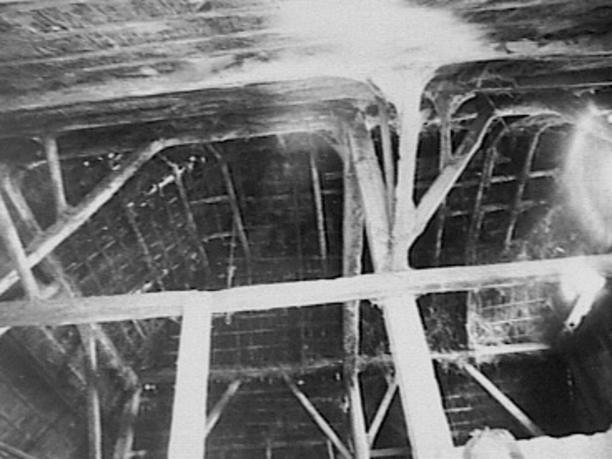 Noordelijk Westfriesland: kapconstructie (opmerking: Deze afbeelding hebben wij helaas alleen in deze lage resolutie.)